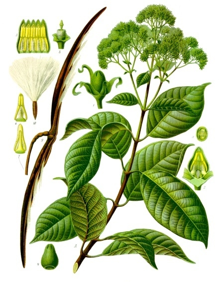 Malayische Krugblume. A blühender Zweig natürlicher Grösse. 1 Blüte von der Seite; 2 Blüte im Längsschnitt; 3 Querschnitt der Frucht und des Discus; 4 Korolle von aussen; 5 aufgeschnittene Korolle mit den Staubblättern; 6 Staubblatt von innen; 7 desgleichen von aussen gesehen; 8 Discus und Griffel; 9 Frucht etwas verkleinert (2/3); 10 Samen natürlicher Grösse. 1—8 vergrössert.